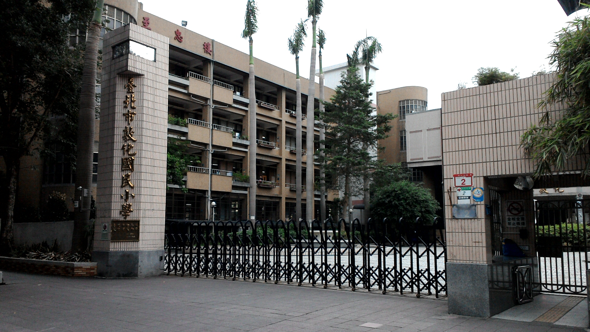 臺北市松山區敦化國民小學(前門)